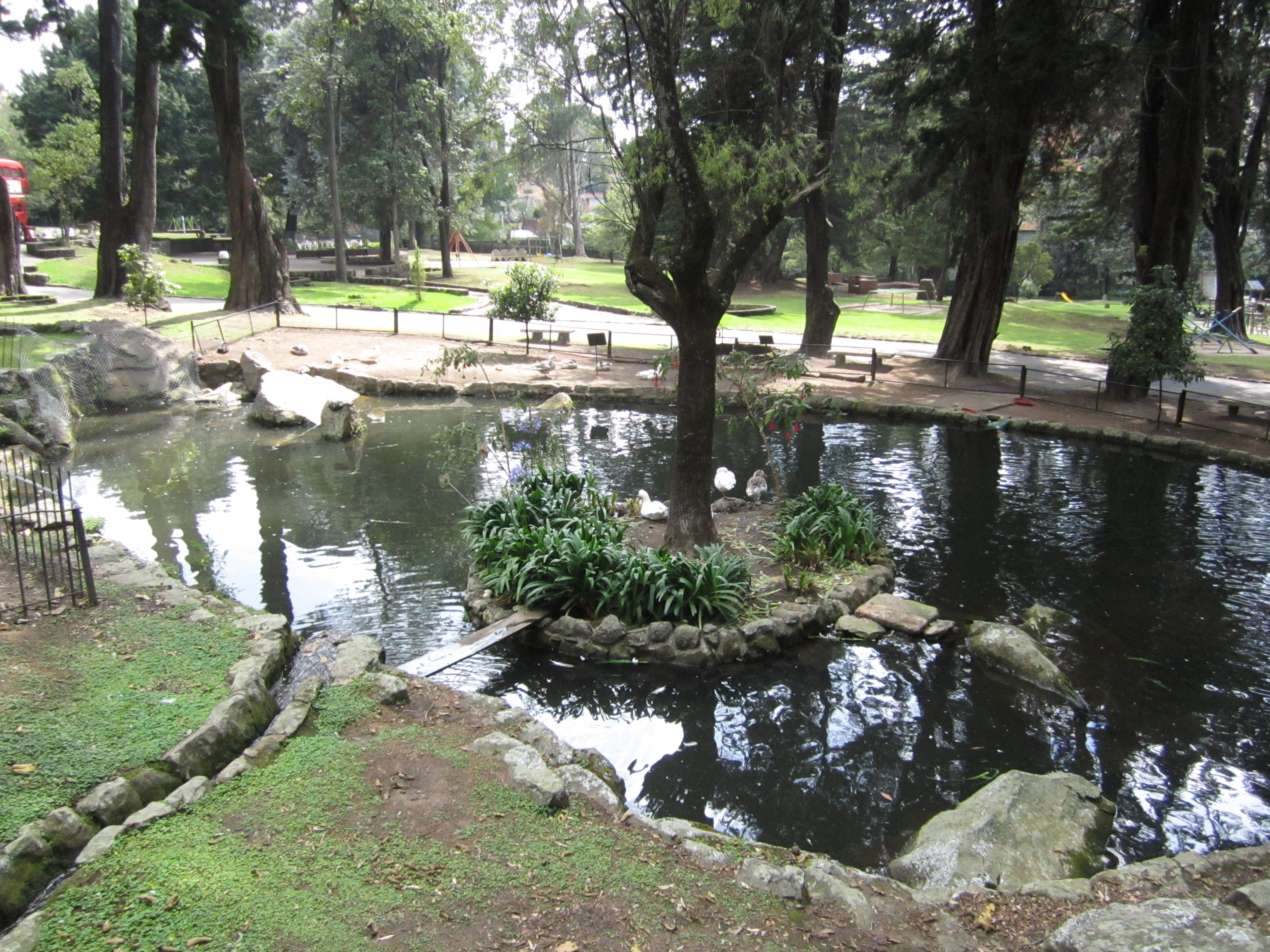 Lago del Parque del Chicó situado al norte de Bogotá.